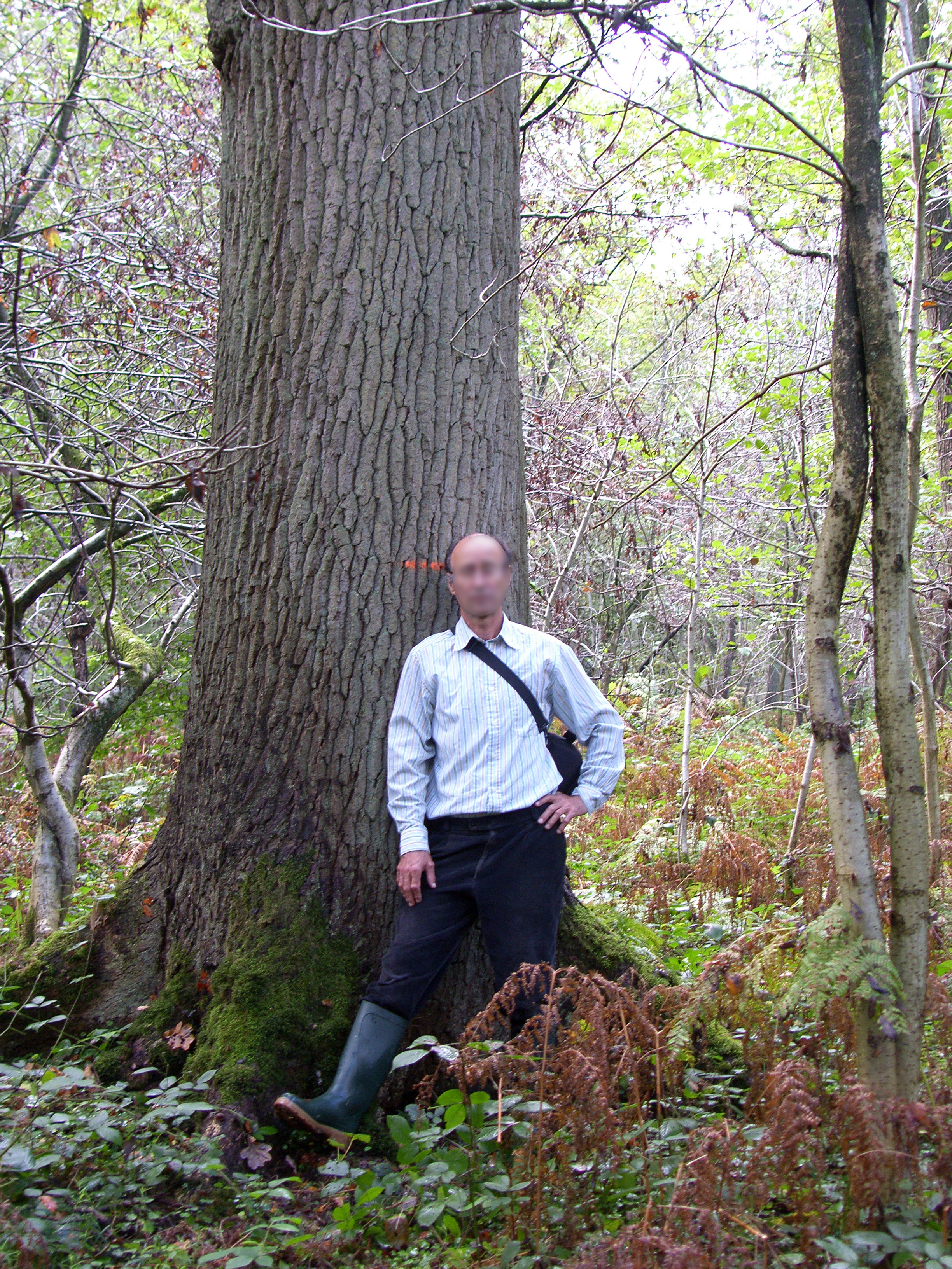 Chêne Chêne au moins bicentenaire en orêt de Flines-lez-Mortagne (frontière belge, nord de la France), avec marque d'abattage, octobre 2014